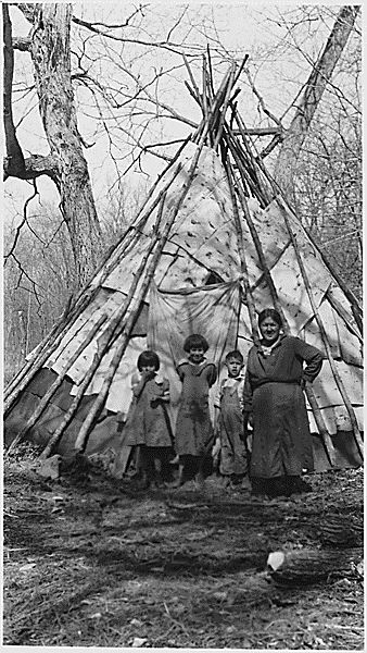 Indian woman and children in front of teepee , ca. 1938